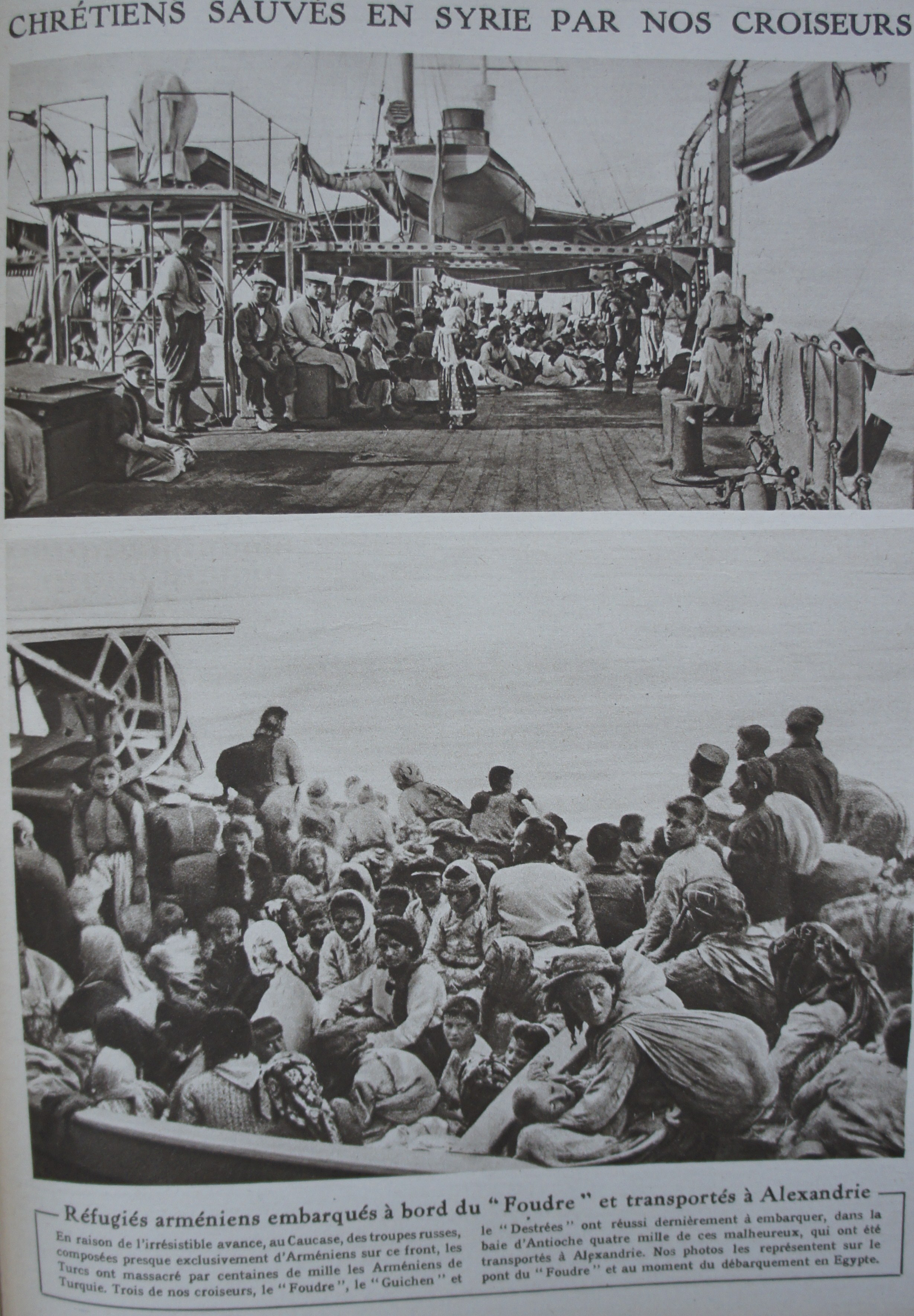 extrait du journal "le miroir".